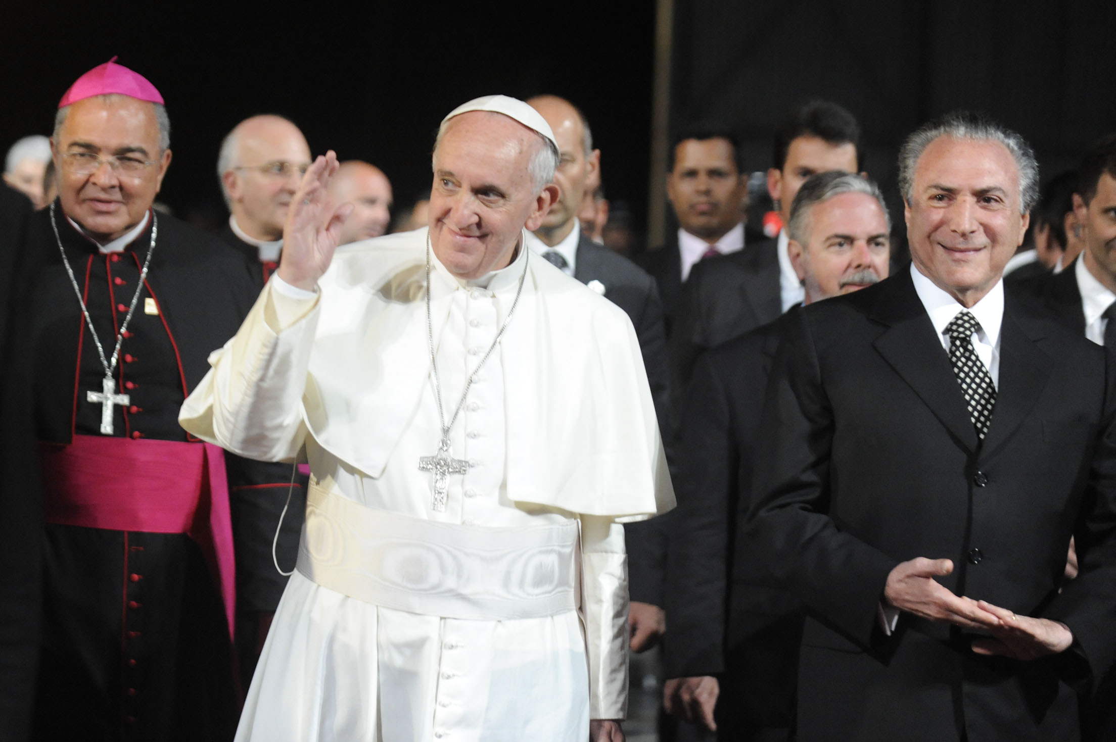 Rio de Janeiro - Papa Francisco embarca de volta para Roma na base aérea do Galeão. Antes participa de cerimônia de despedida com o vice-presidente Michel Temer.